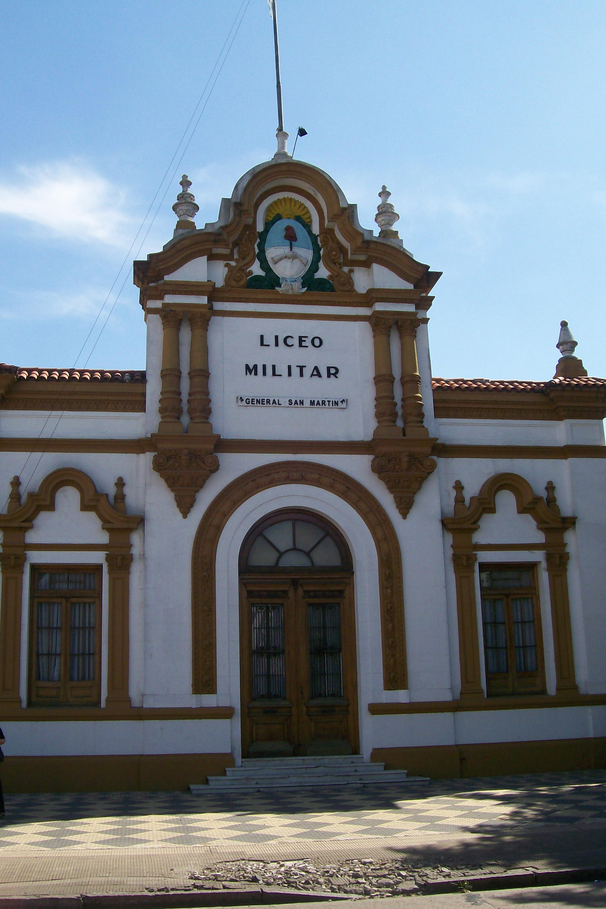 Liceo Militar de Gral San Martín